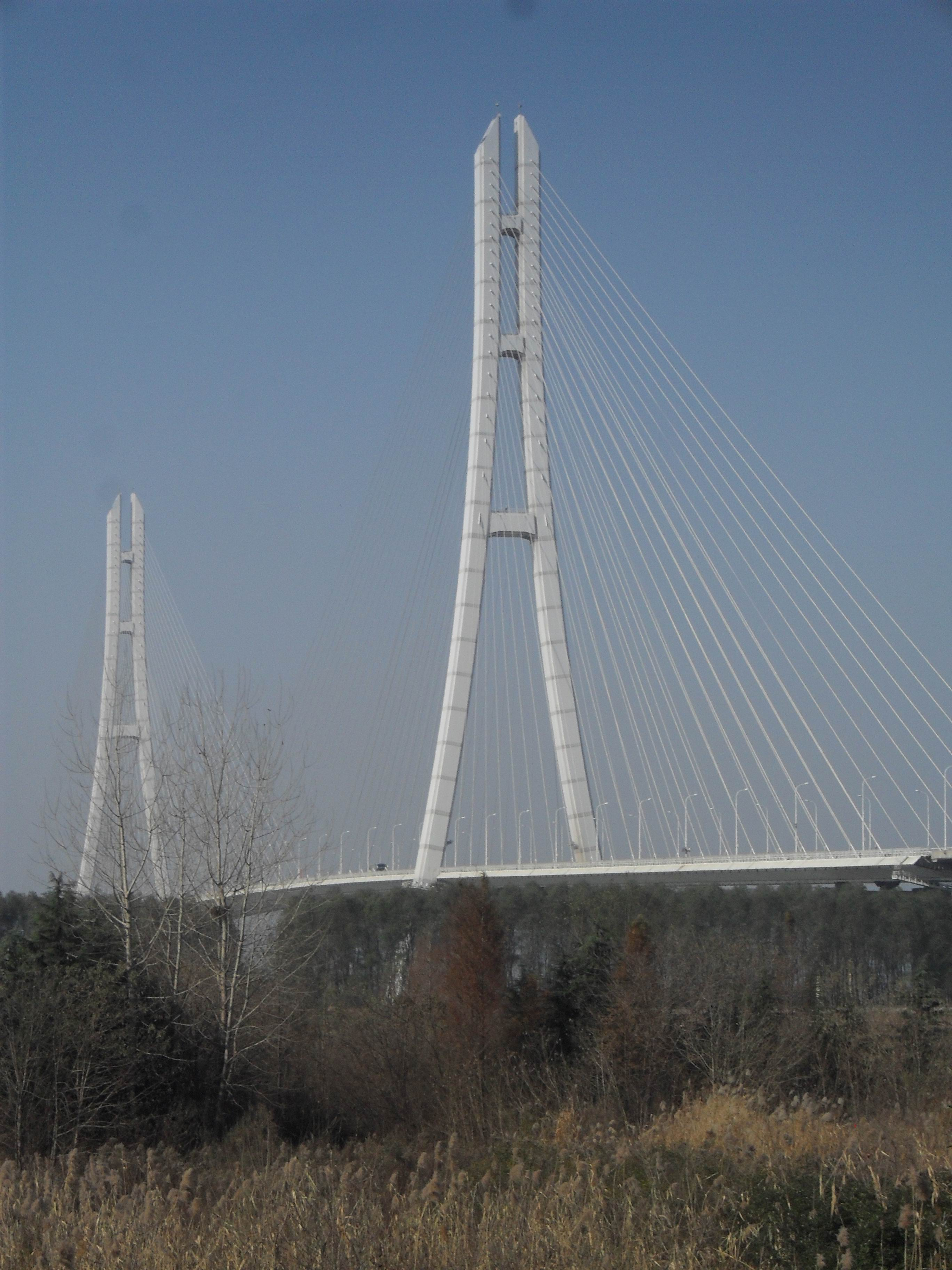 南京长江三桥 Nanjing Yangtze River Bridge